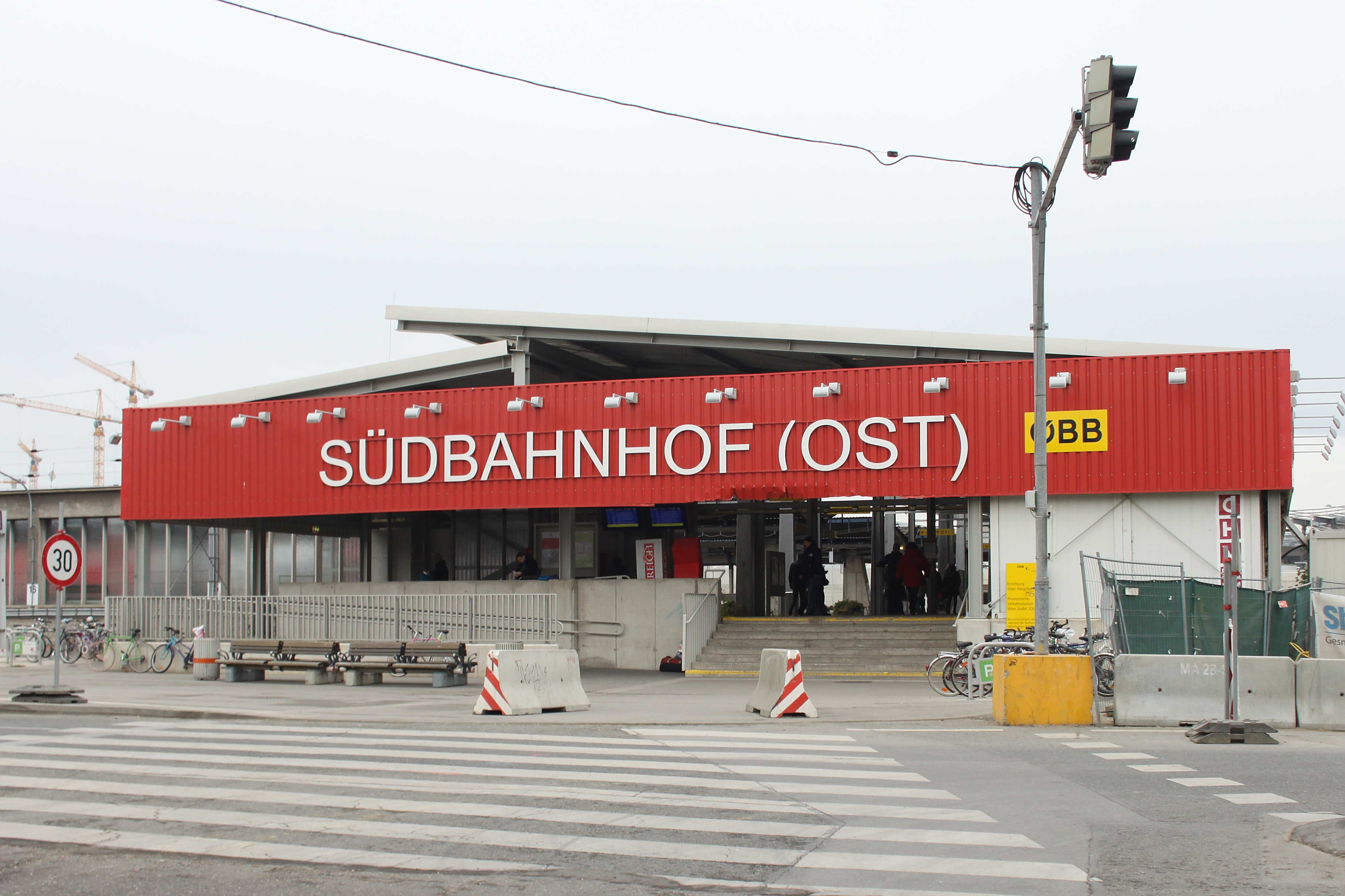 Wien Südbahnhof (Ost), Provisorium